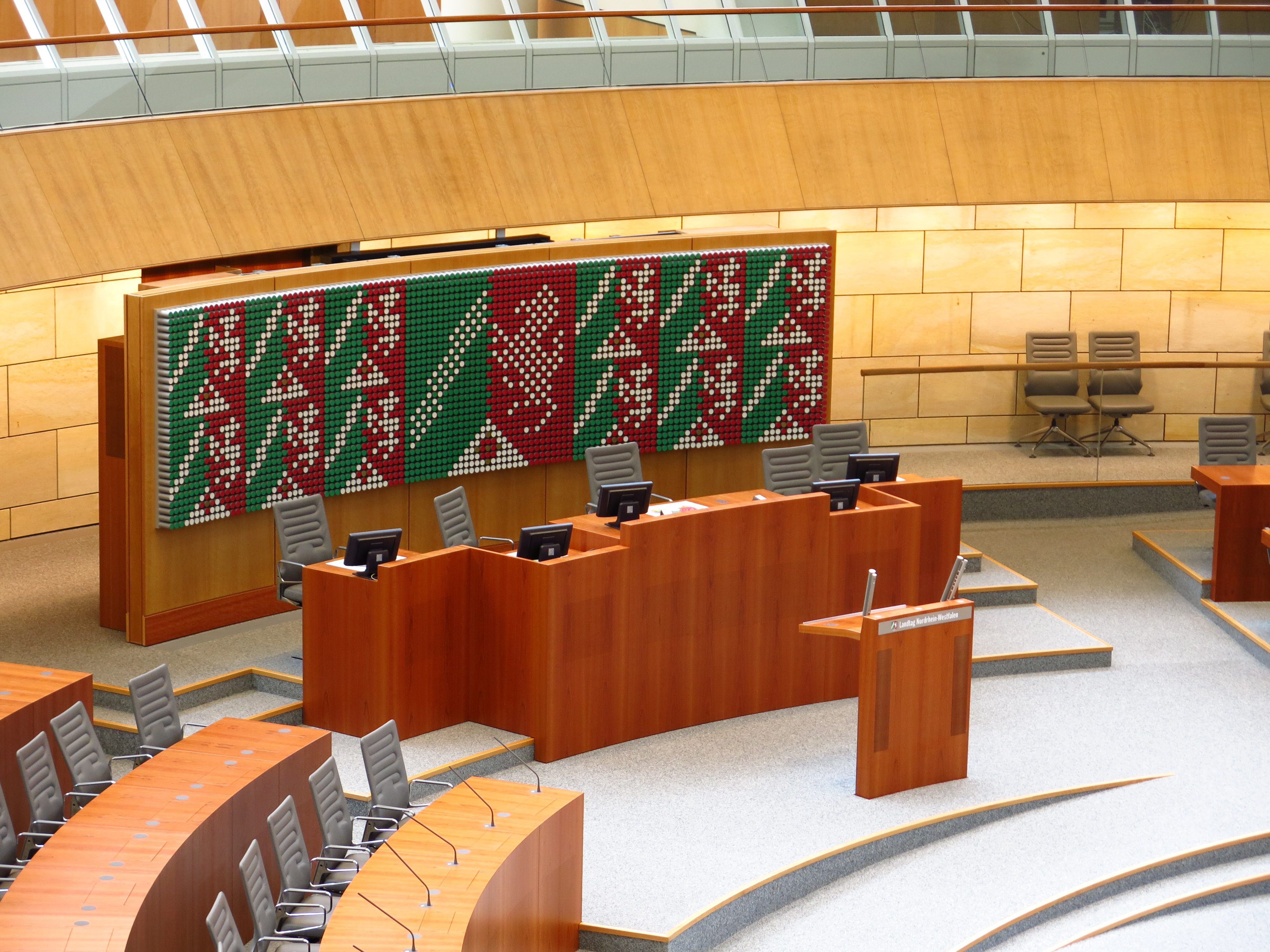 Innenbereich des Landtages Nordrhein-Westfalen